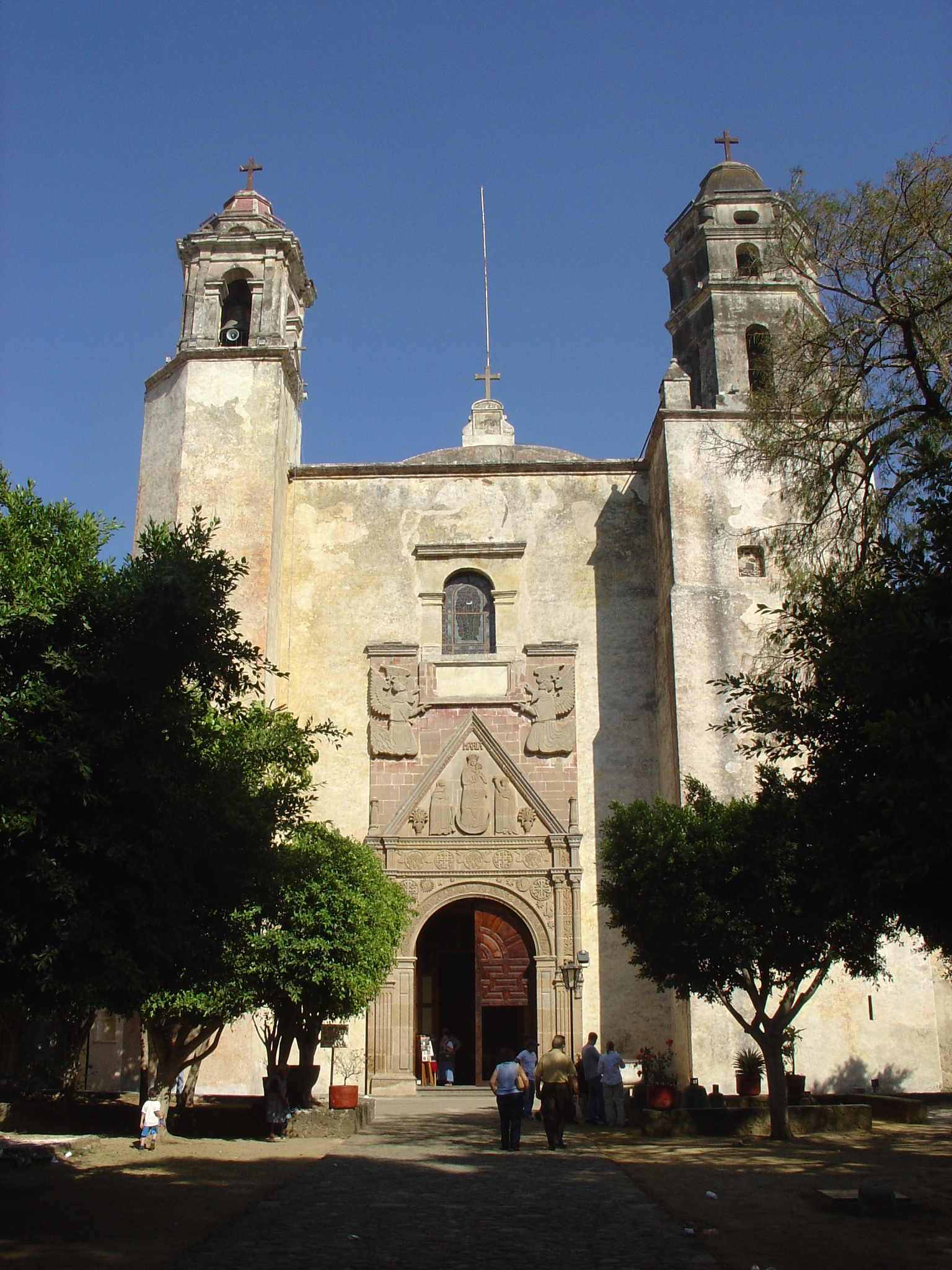 Exconvento dominico de Tepoztlán (1570)